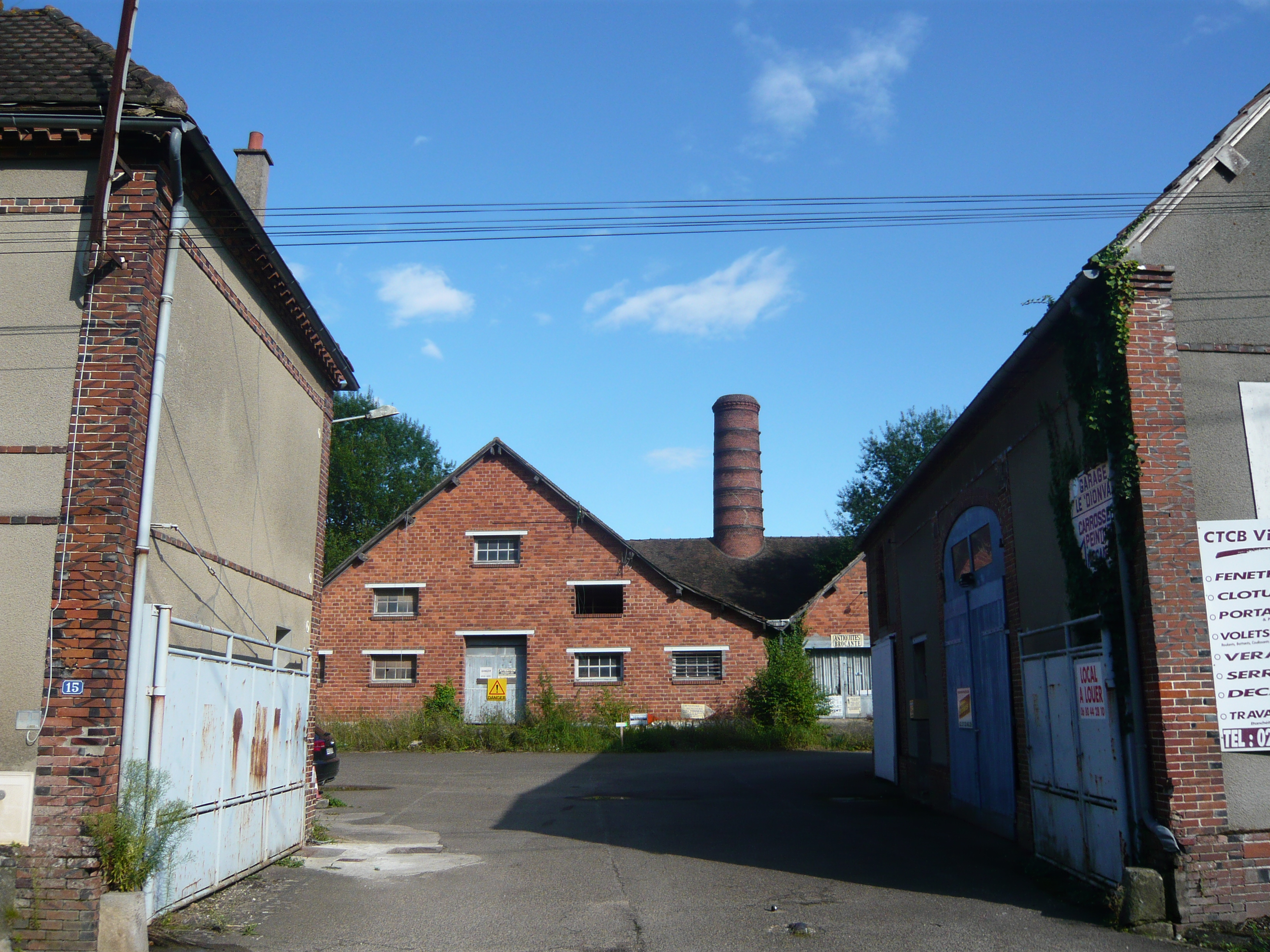 Briqueterie Lambert, Saint-Piat, Eure-et-Loir (France).